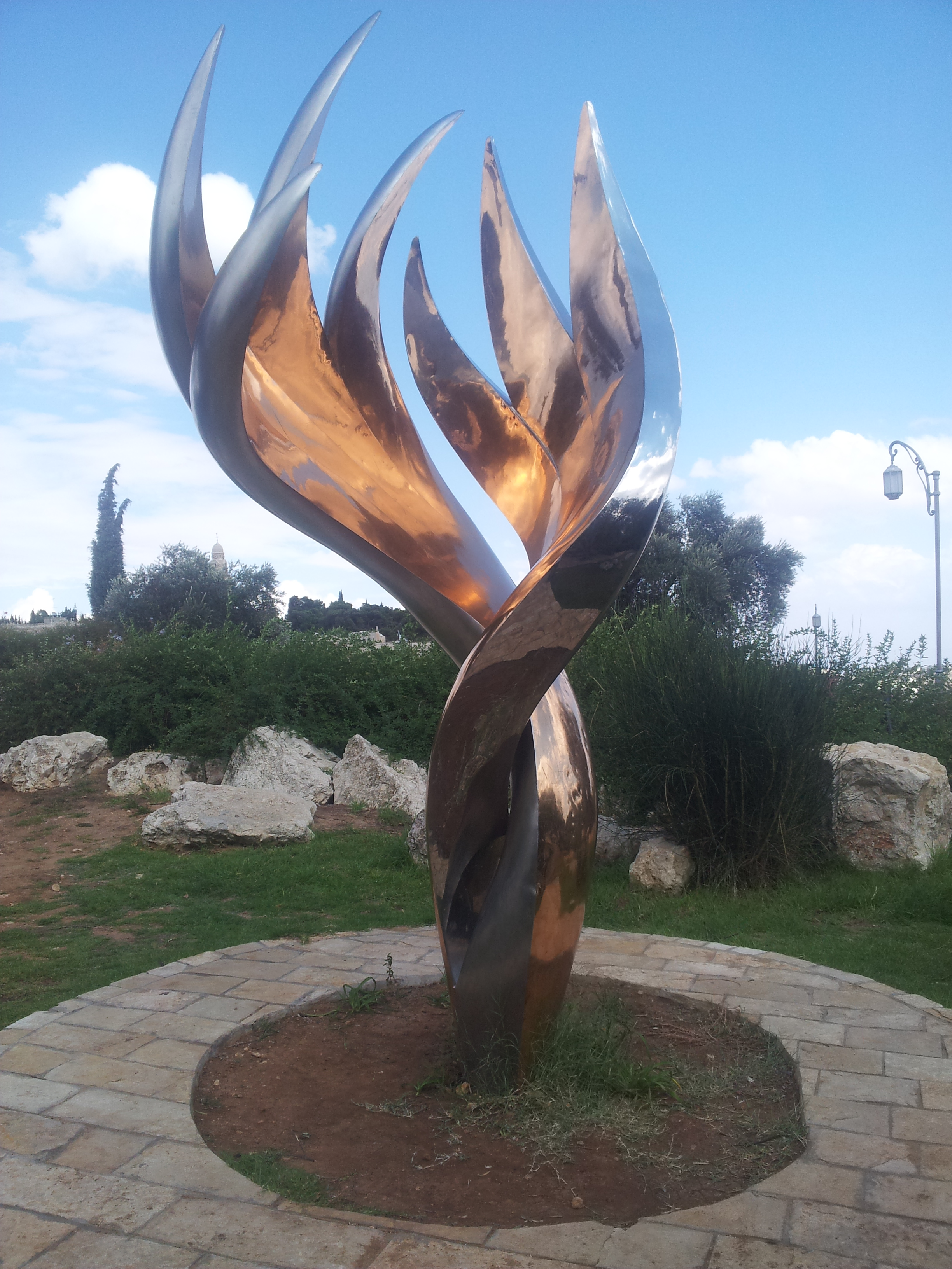 אנדרטה לחטיבת עציוני בגן בלומפילד בירושלים